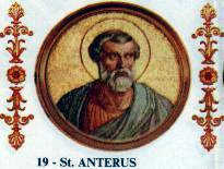 Pope Anterus